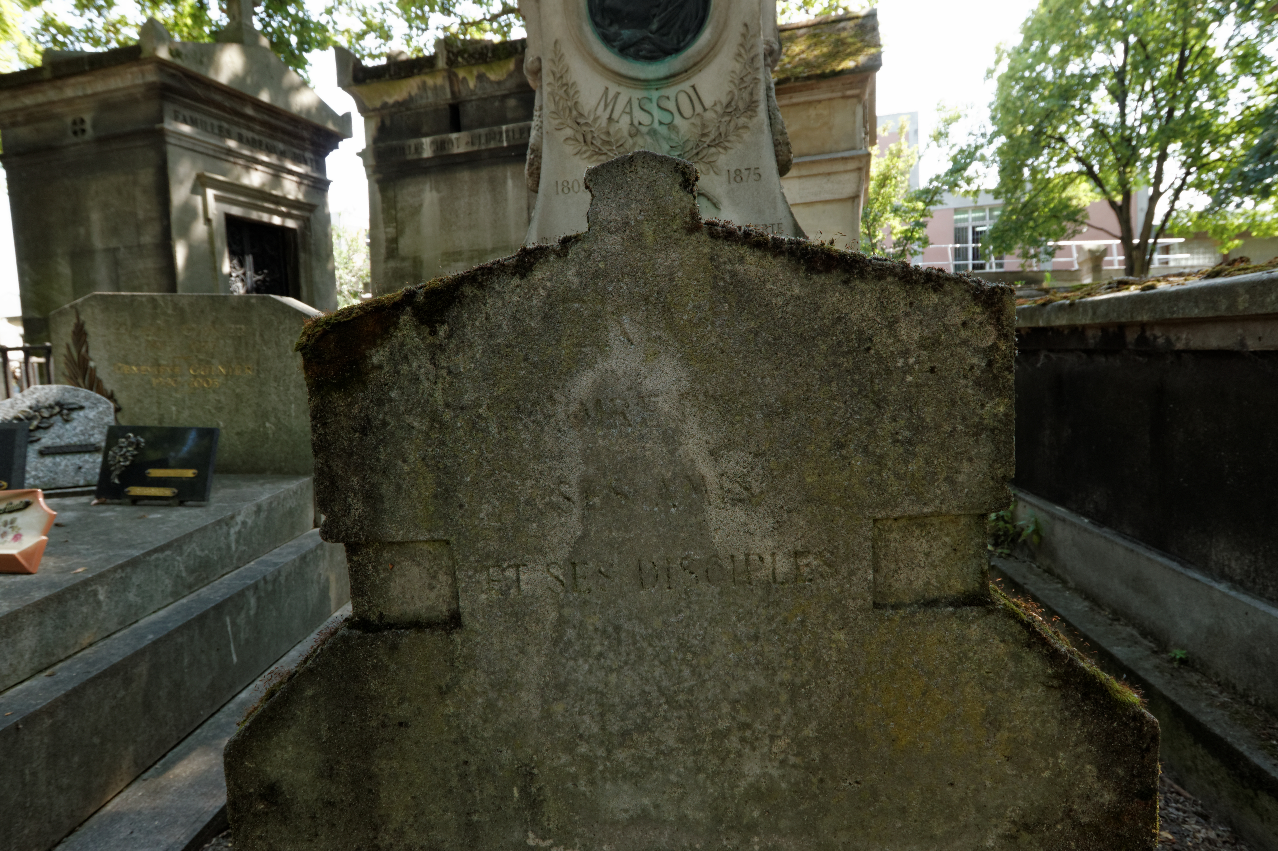 Inscriptions